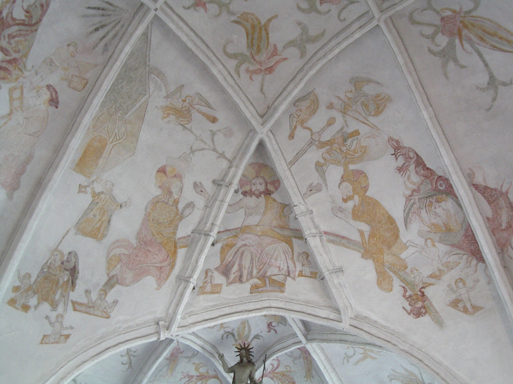 Dorum, Kirche St. Urbanus Fresco Foto von Benutzer:Geoz 2005